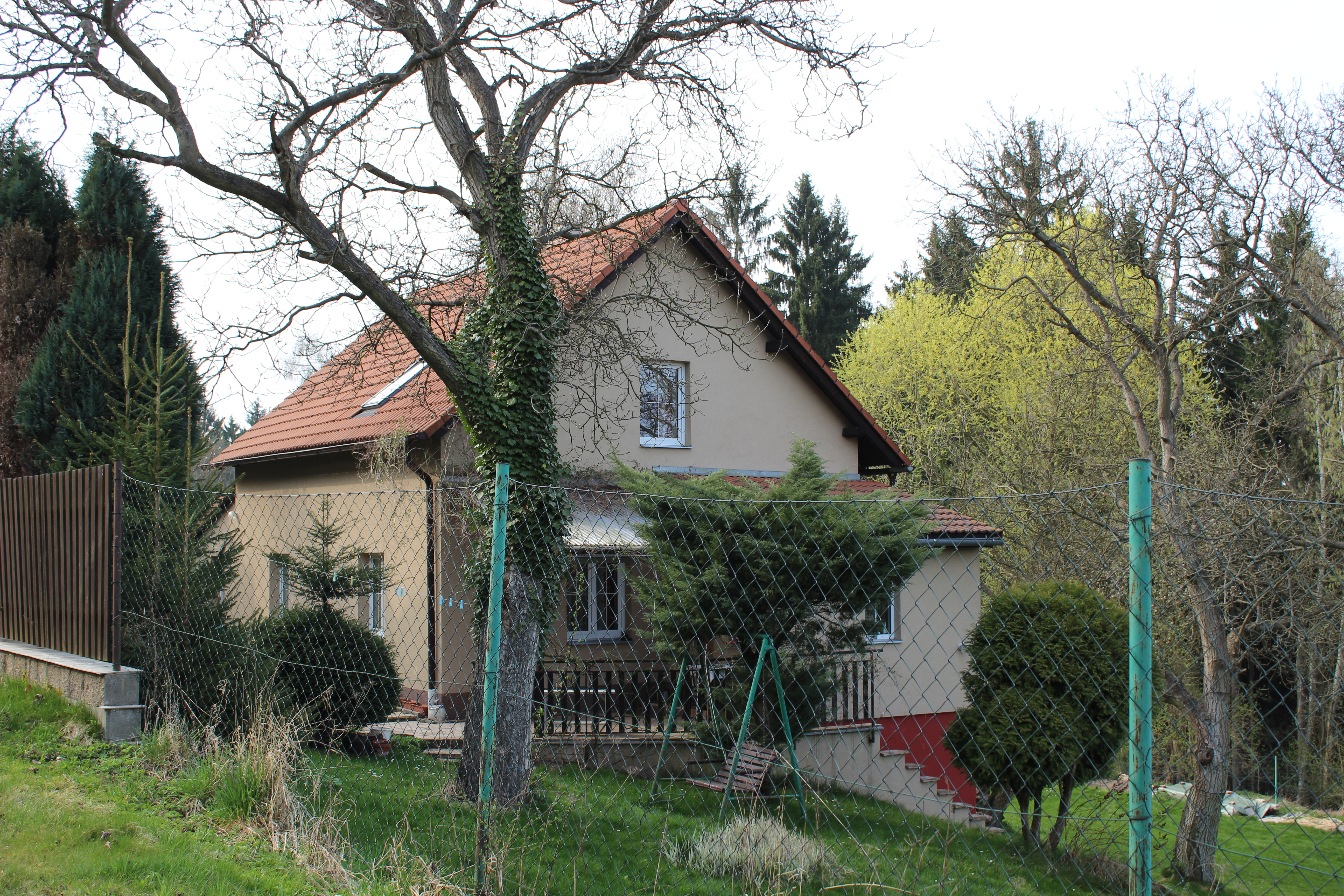 Dům evidenční číslo 315 v Bezdědicích, části Bělé pod Bezdězem (pohled od jihovýchodu). This photograph was taken with a Canon EOS 600D